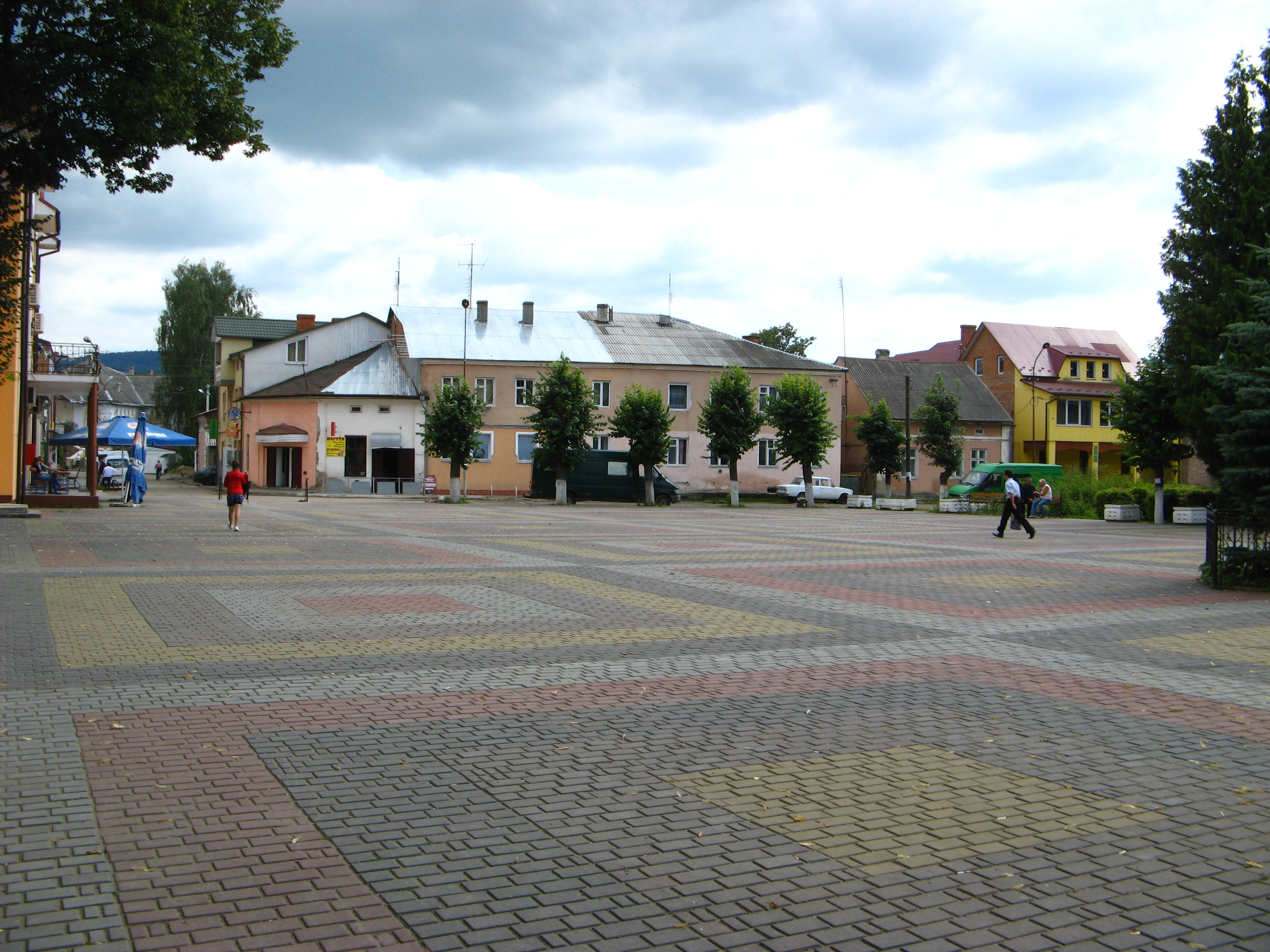 м. Хирів (Старосамбірський р-н, Львівська обл.)